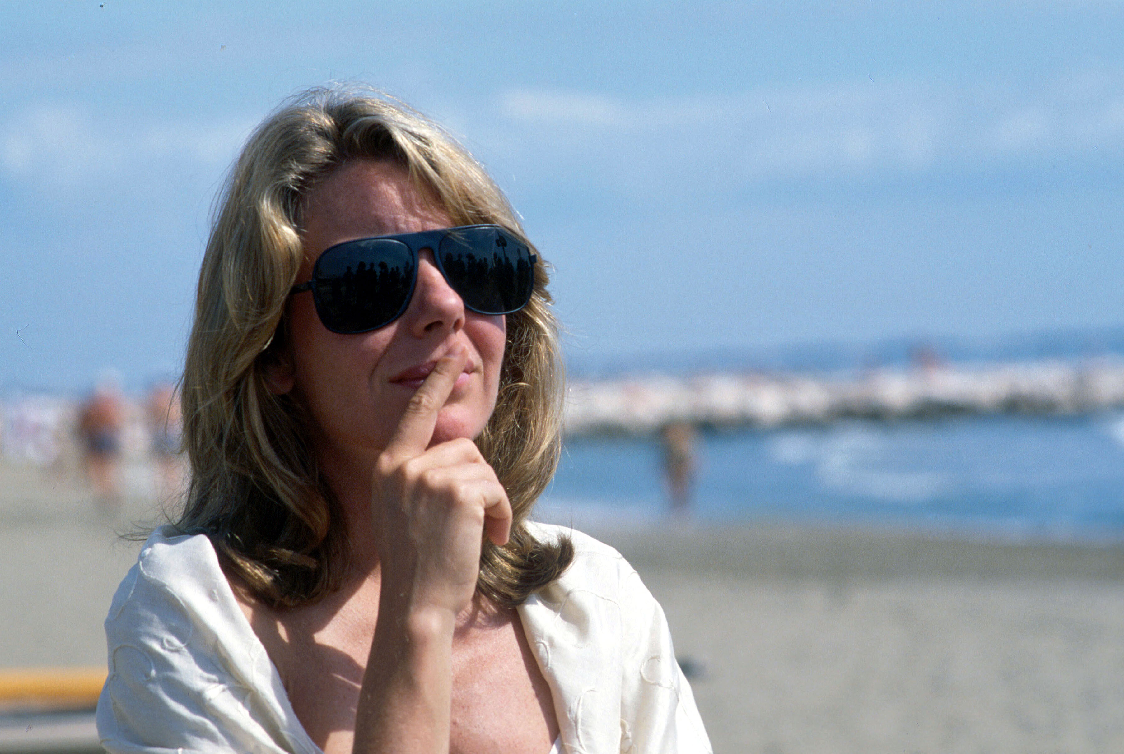 L'attrice Jill Clayburgh alla Mostra del cinema di Venezia del 1983